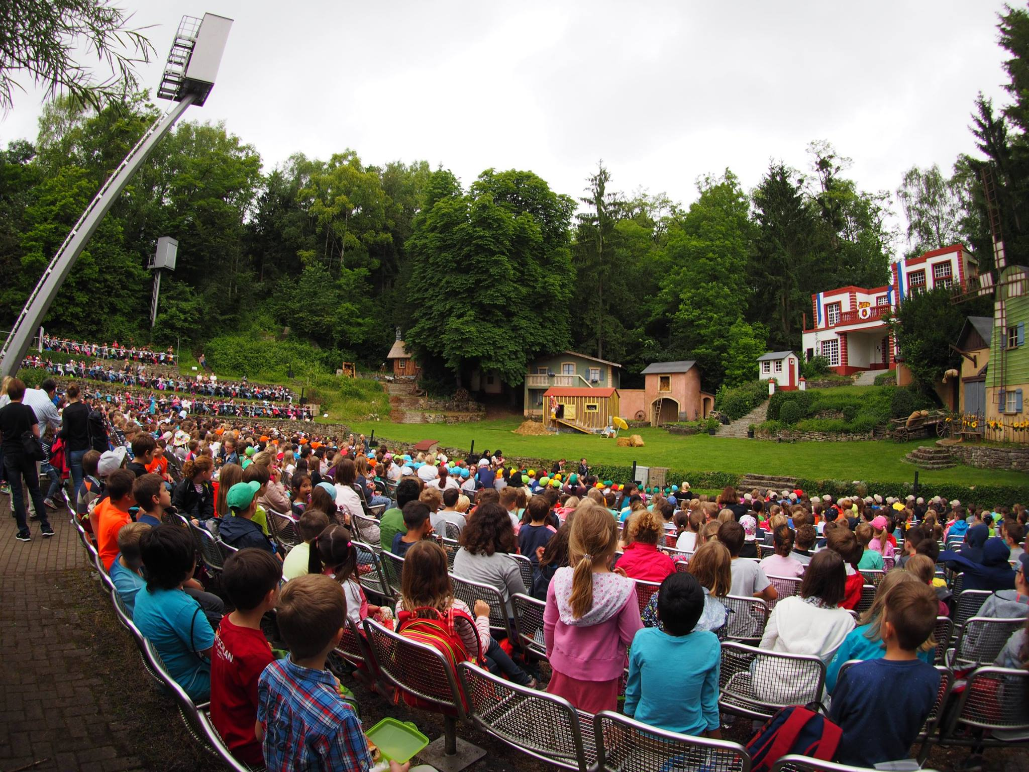 Die Bremer Stadtmusikanten